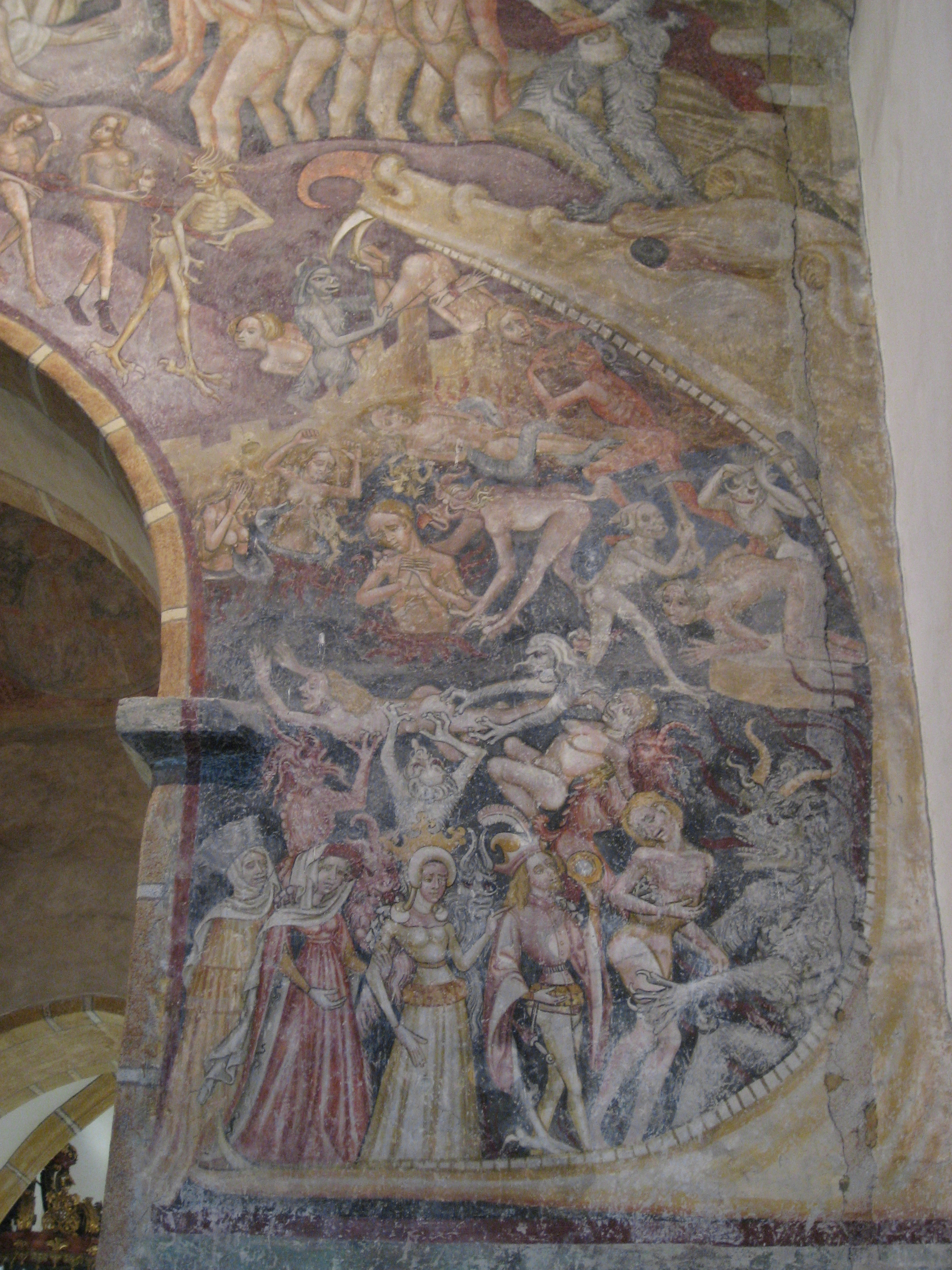 St.Ruprecht in Bruck an der Mur (Austria), gotische Fresken